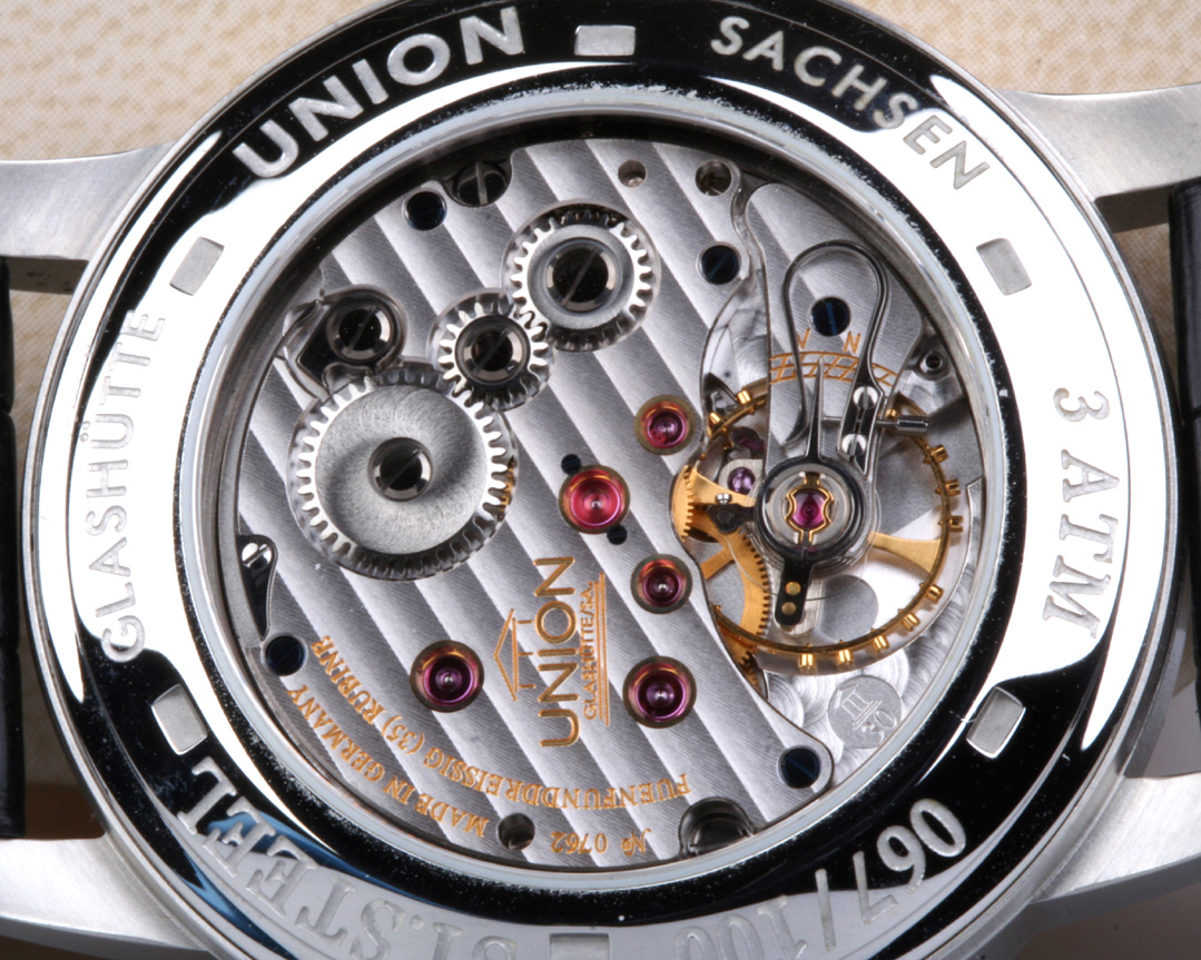 UNION Bergter Gangreserve Rückseite